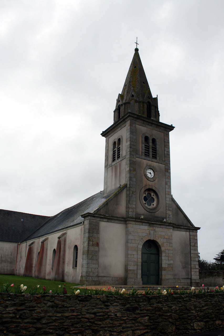 Eglise de Bangor à Belle-Ile